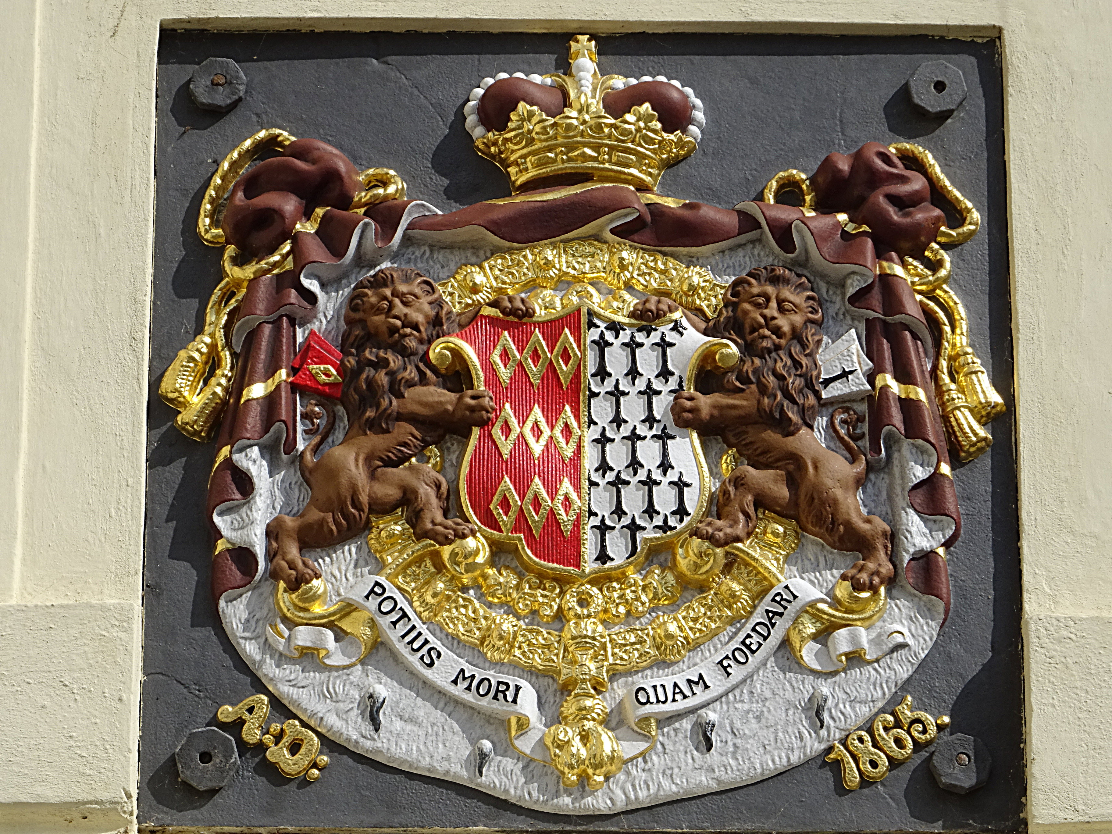 Rohan-Wappen der böhmischen Linie auf Schloss Svijany